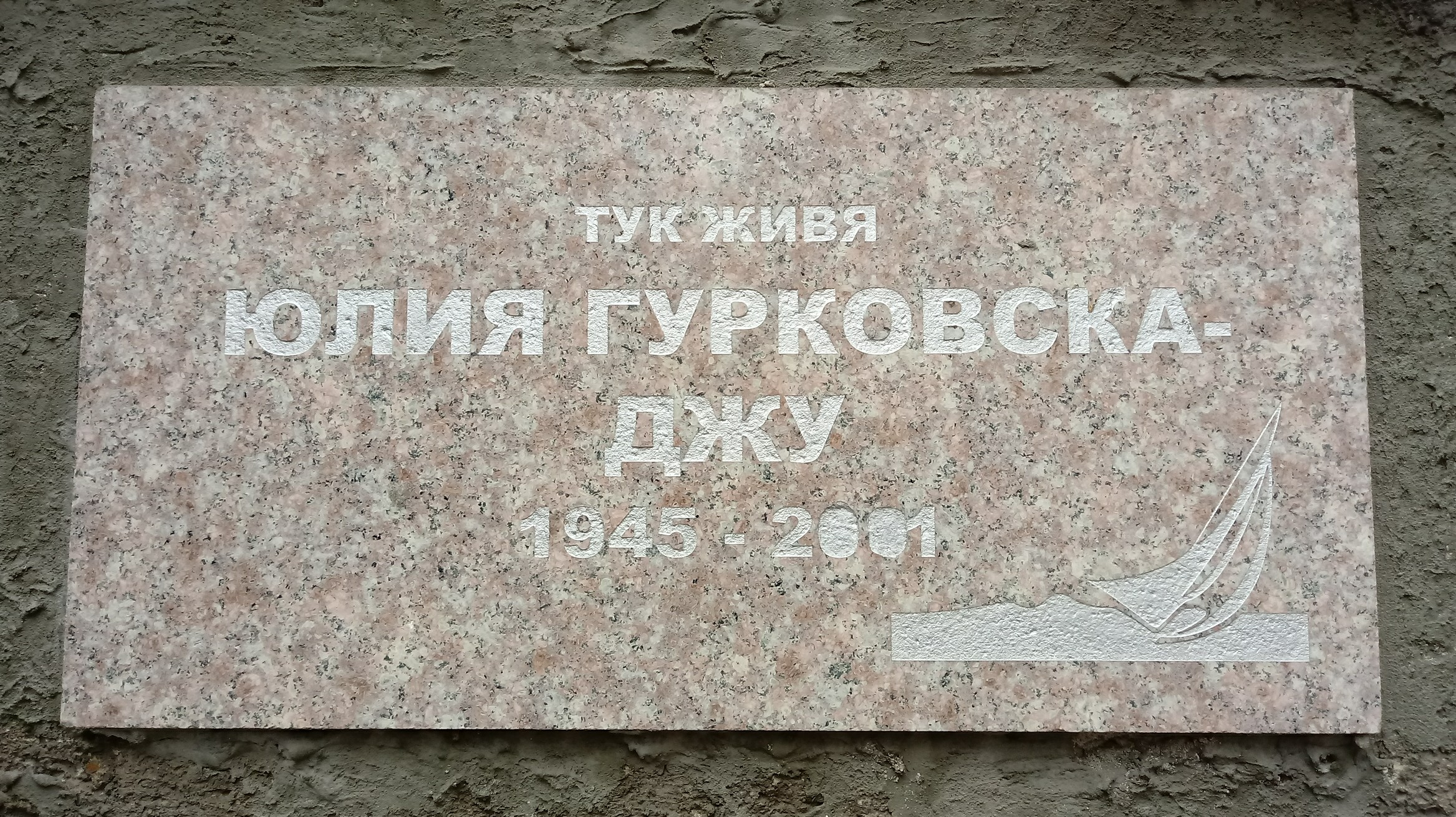 Yulia Gurkovska memorial plaques, 7A Bistritsa Str., Sofia